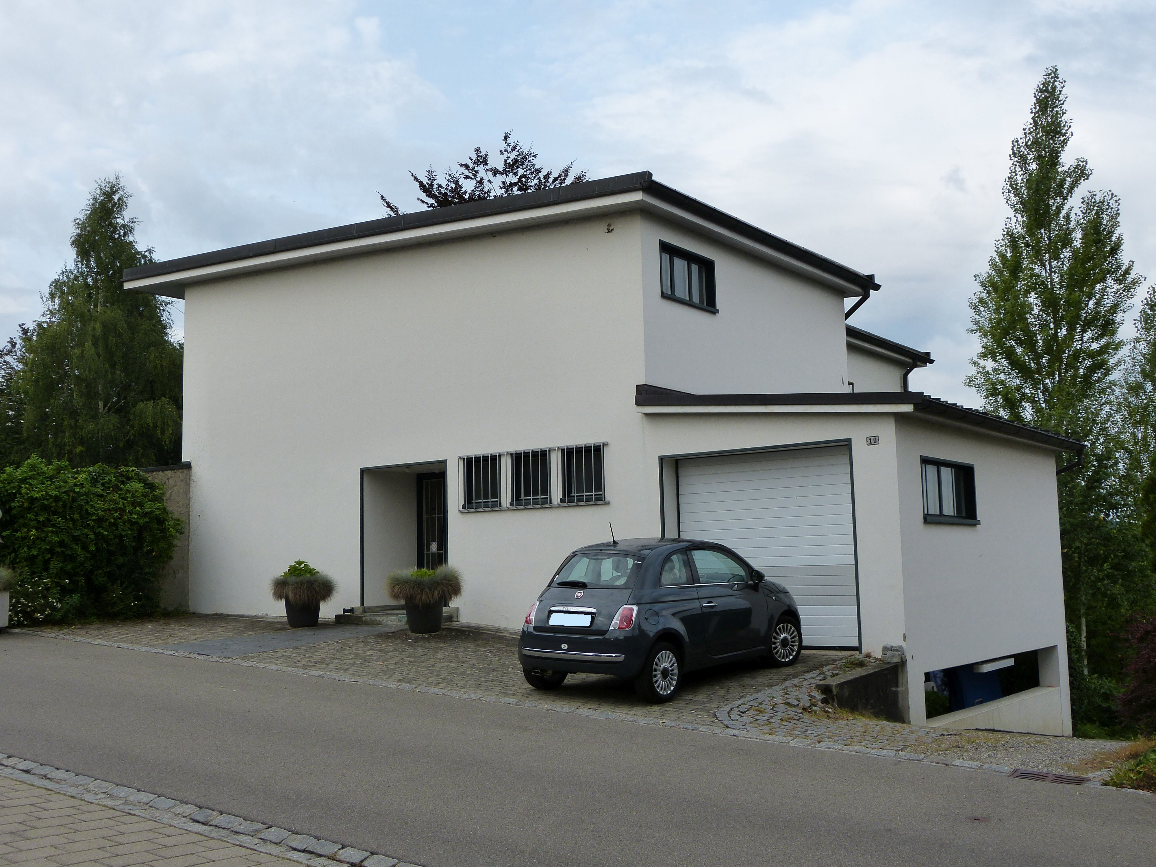 Wohnhaus